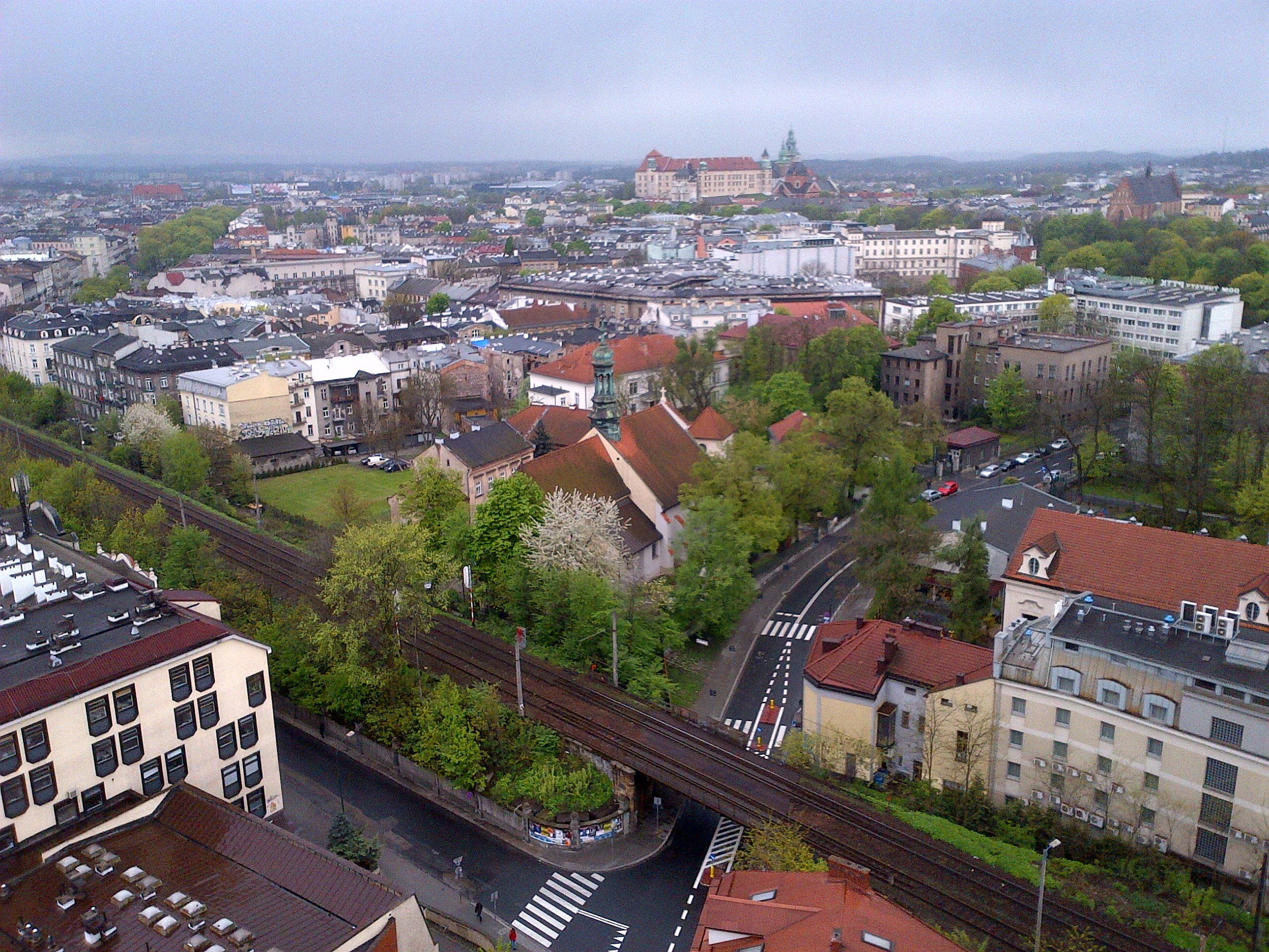 Widok z wieży na zachód. w dole widoczna ulica Kopernika i Blich (prostopadła). Tory kolejowe prowadzące na Dworzec główny i na Zabłocie. Na drugim planie widoczny kościół św. Mikołaja. Na horyzoncie od lewej: Wzgórze Wawelskie, kościół św Piotra i Pawła a także kosćiół oo. Dominikanów.